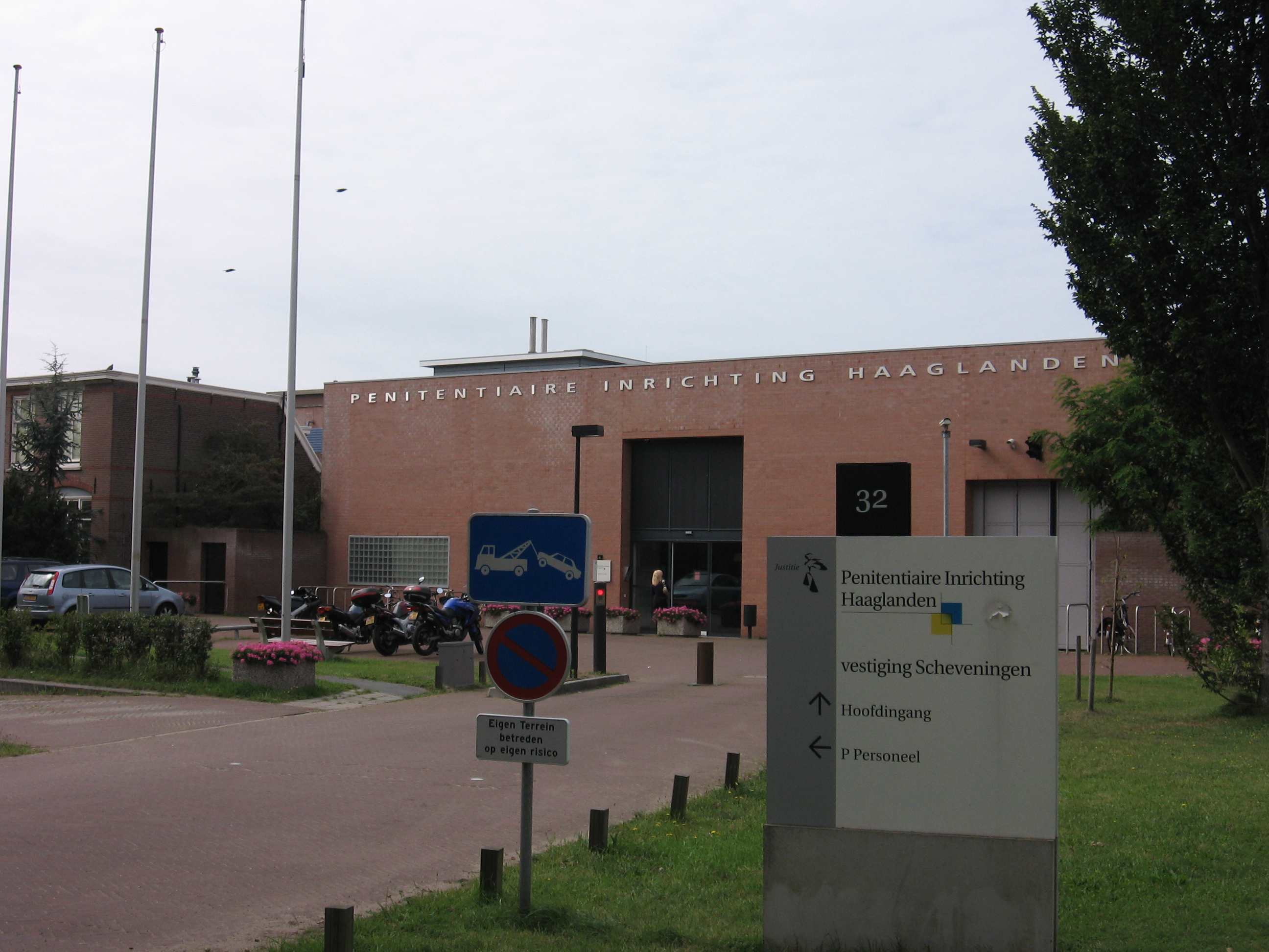 Scheveningse gevangenis, Den Haag/Scheveningen